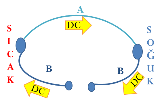 Peltier Etkisi